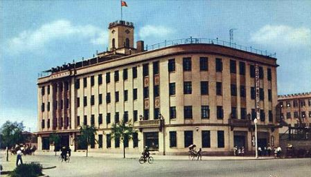 Minakai Dept. store of Hsinking（三中井百货店，新京）